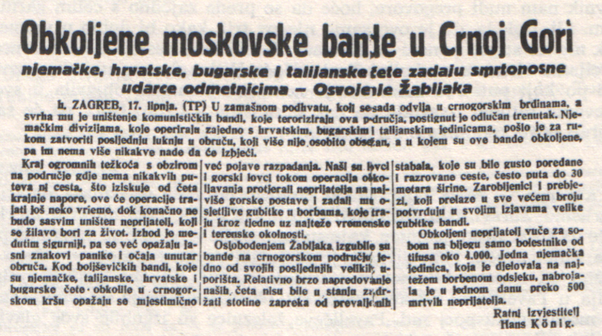 Srpskohrvatski / српскохрватски: Ustaška štampa javlja o Operaciji Schwarz 1943